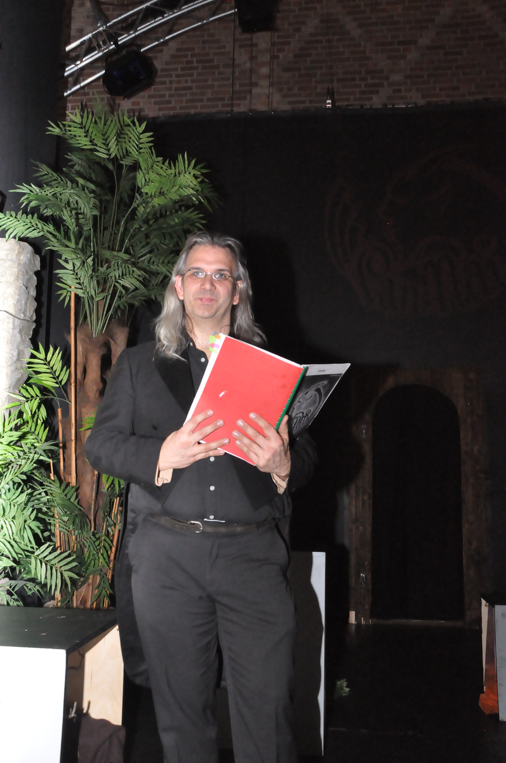 Andreas Rüsing bei einer Operettenprobe 2013